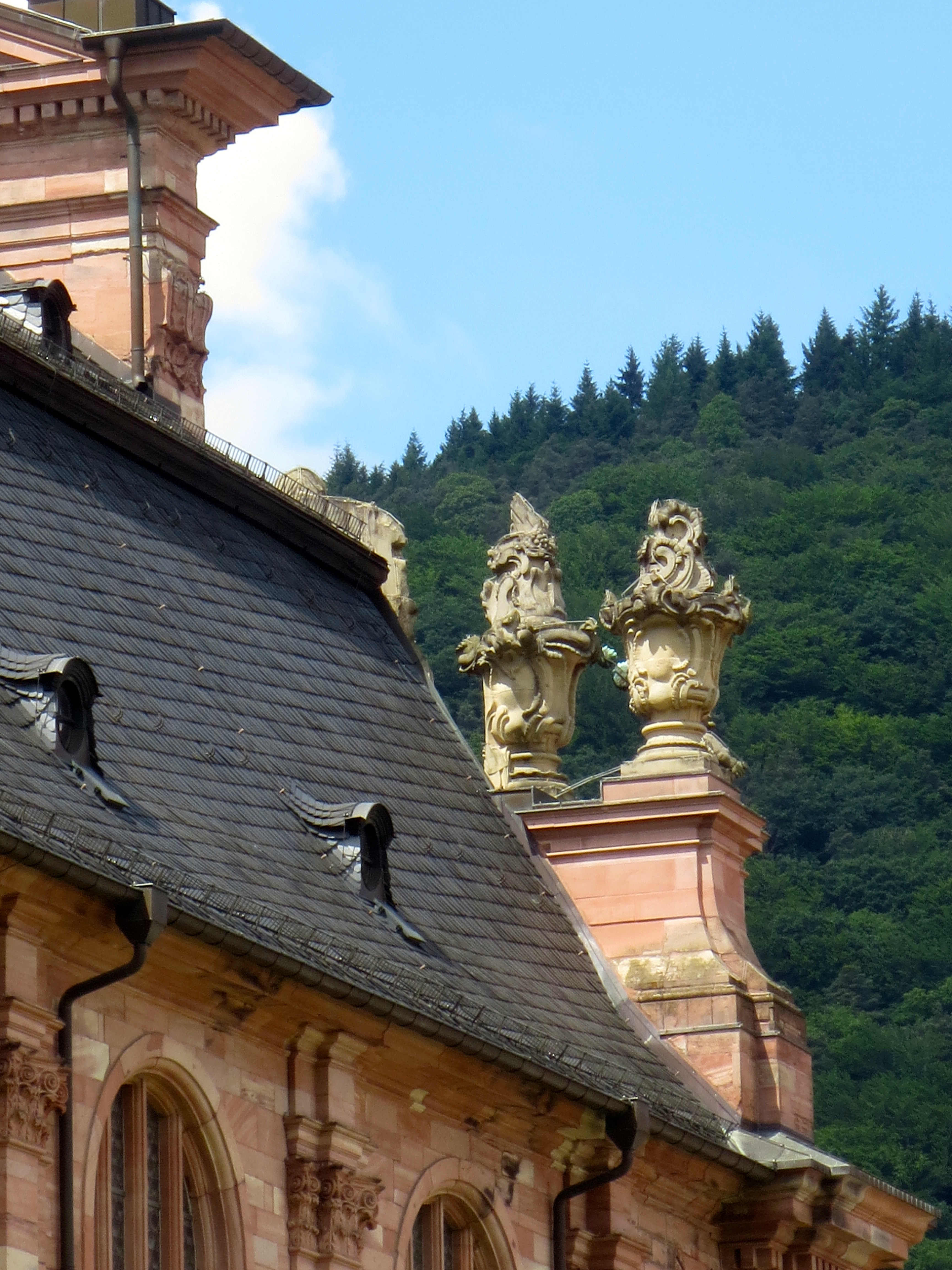 Campus Altstadt Barock Skulptur Giebelschmuck an der Eingangsfassade der Jesuitenkirche Heidelberg mit Heiligenberg Heidelberg im Hintergrund